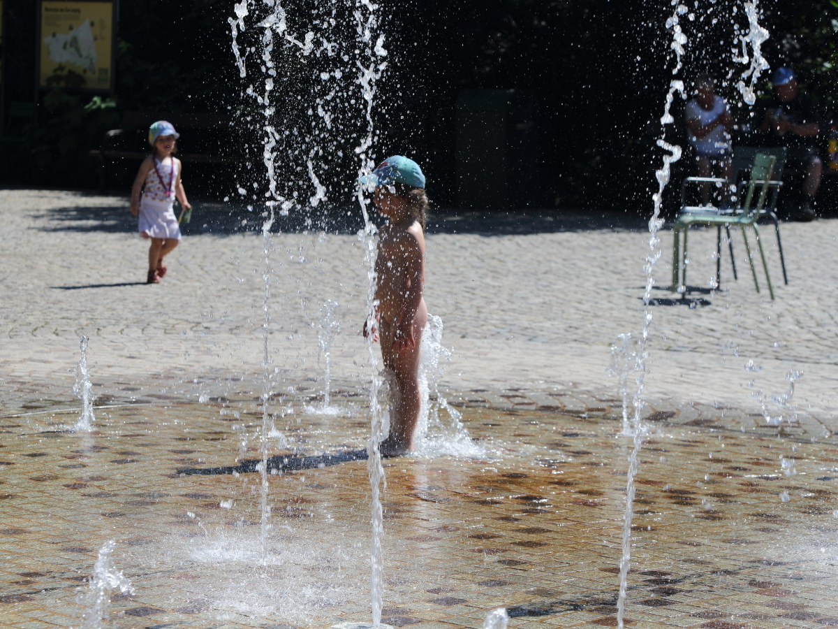 Erfrischung suchendes Kind in einer Brunnenanlage vom Zoo Leipzig